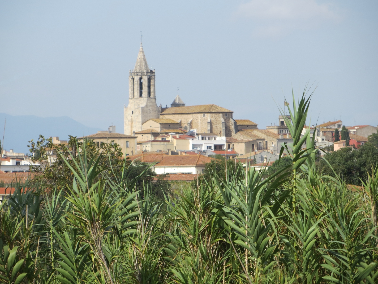 Ort: Cassà de la Selva Bezirk: Gironés Provinz: Girona